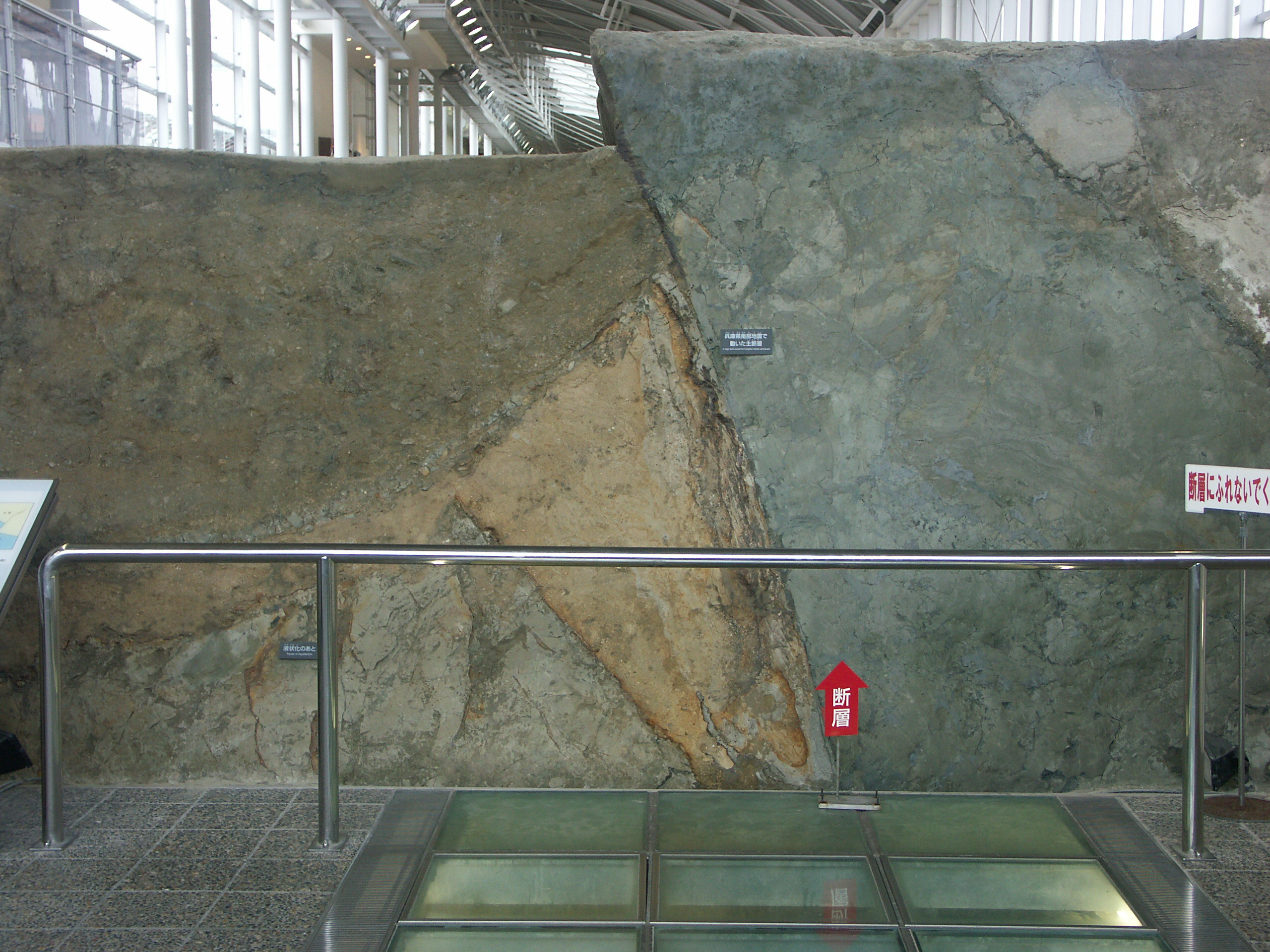 Photographie de la coupe de la faille remobilisée lors du séisme de Kobé (Japon) en 1995, préservée dans le musée "Awaji Island Nojima Fault Preservation Museum"